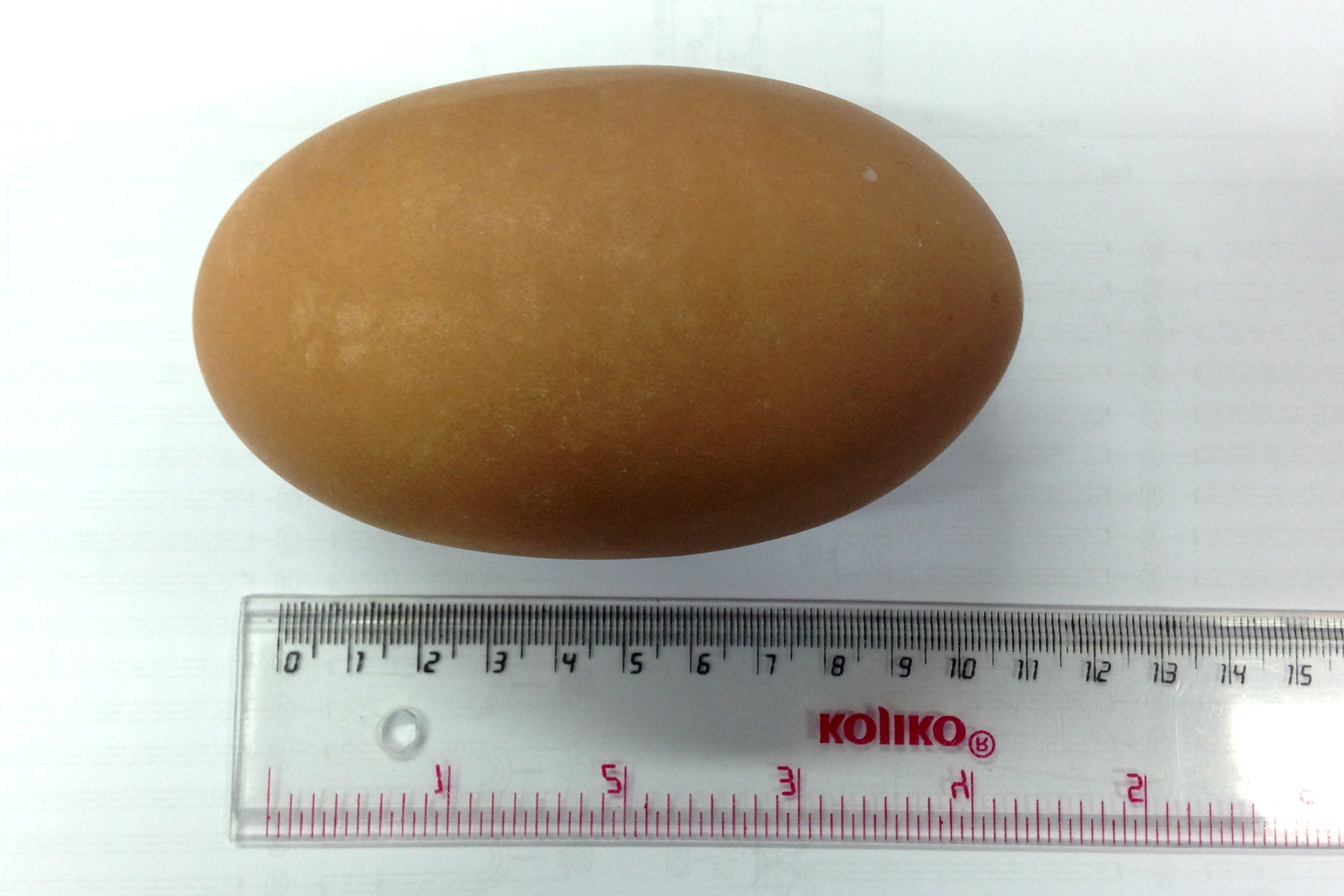 Telur burung maleo